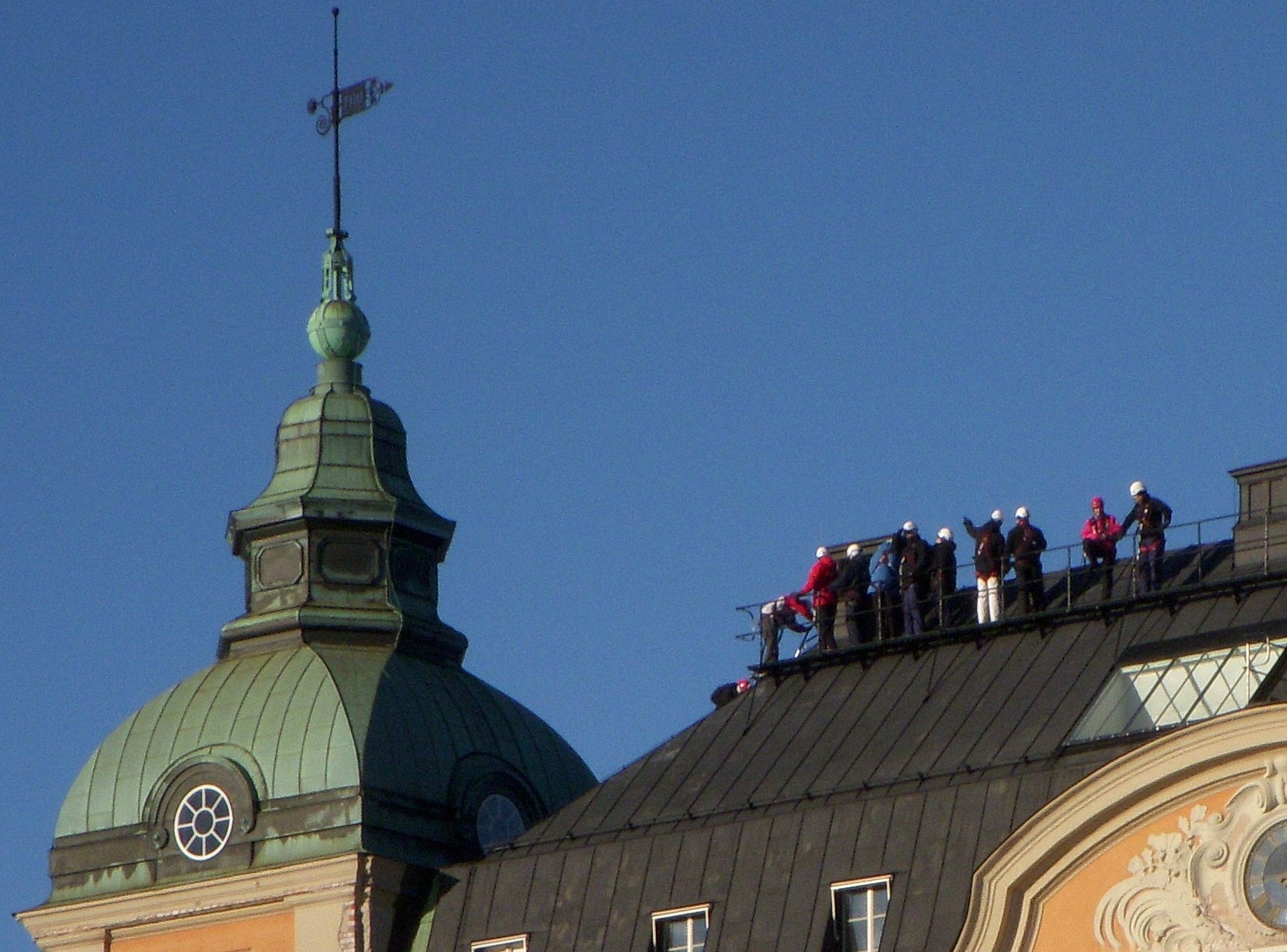 Takvandring på Gamla Riksdagshusets tak, Riddarholmen